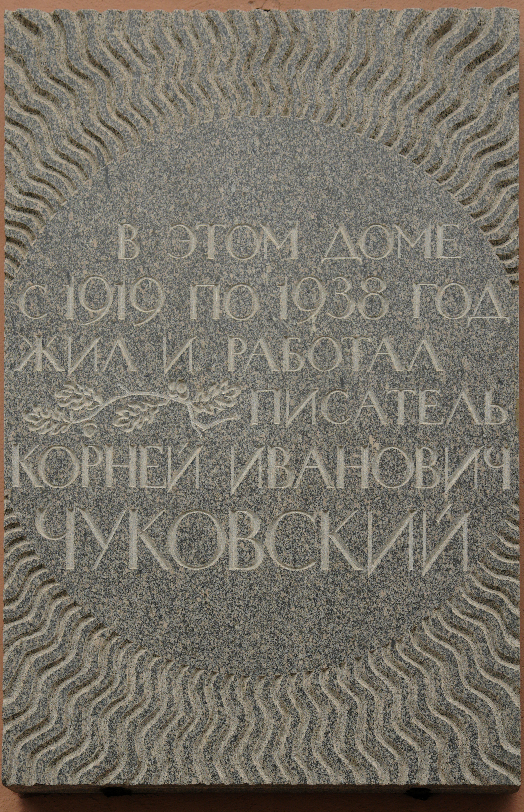 Памятная доска К. Чуковского (Санкт-Петербург, Манежный пер., 6).